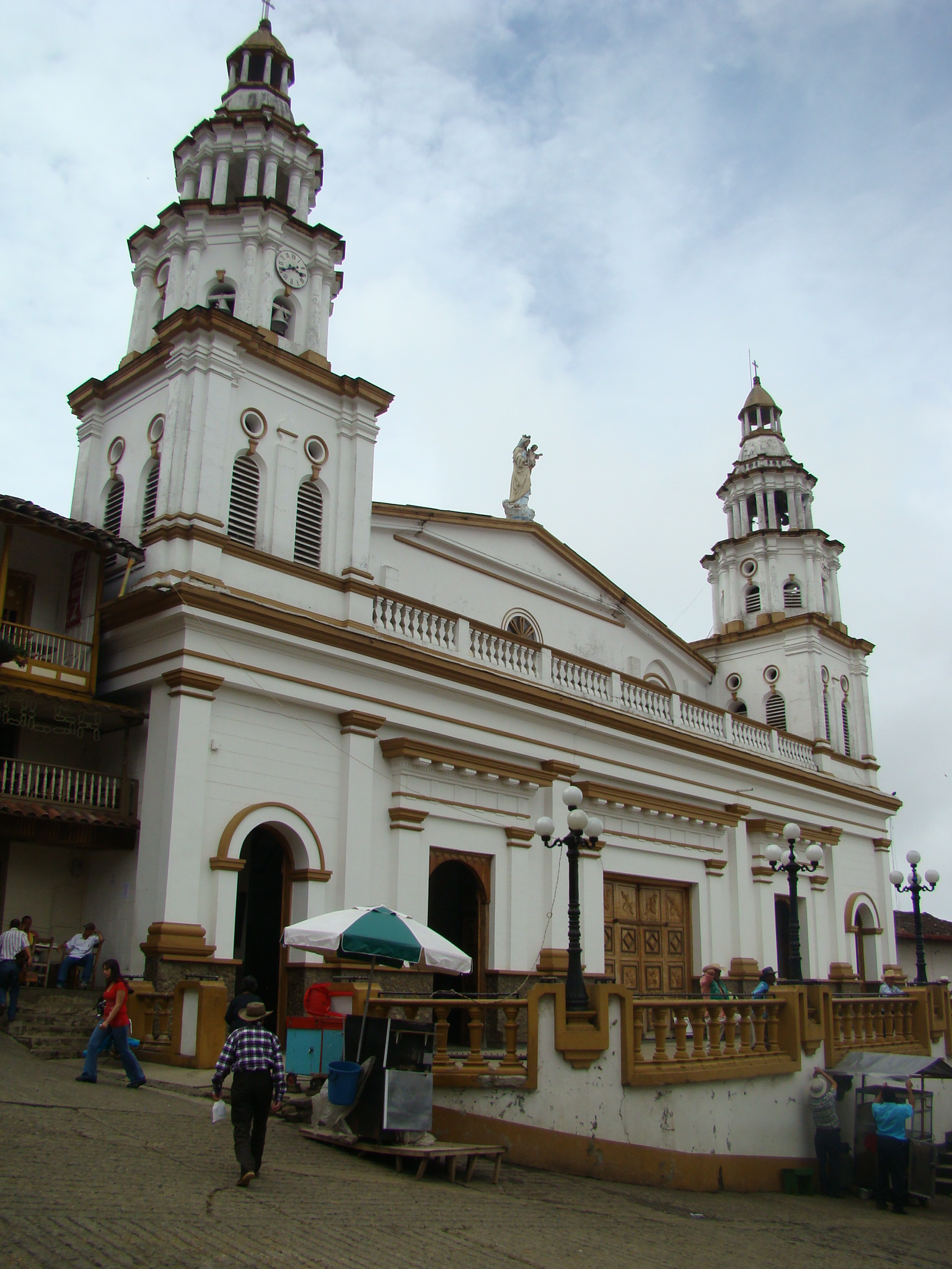 Iglesia de Concordia, Antioquia.